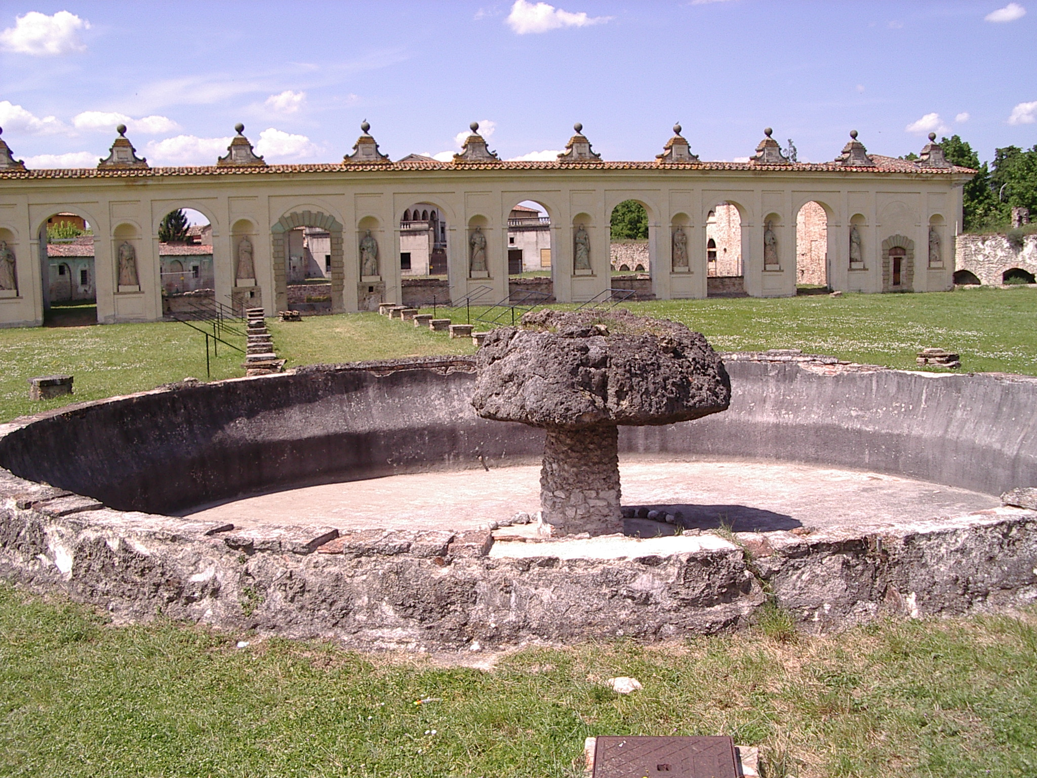 Città di Castello Palazzo Vitelli Ombrie Italy